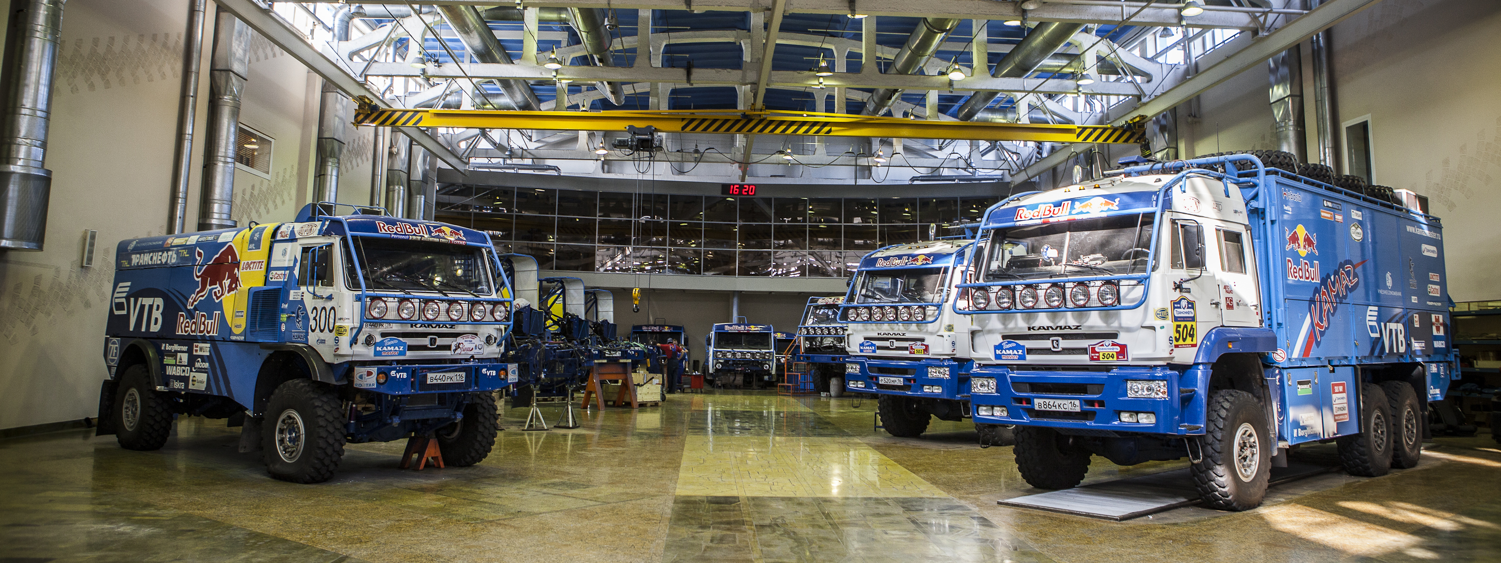 Спортивный центр «КАМАЗ-мастер»